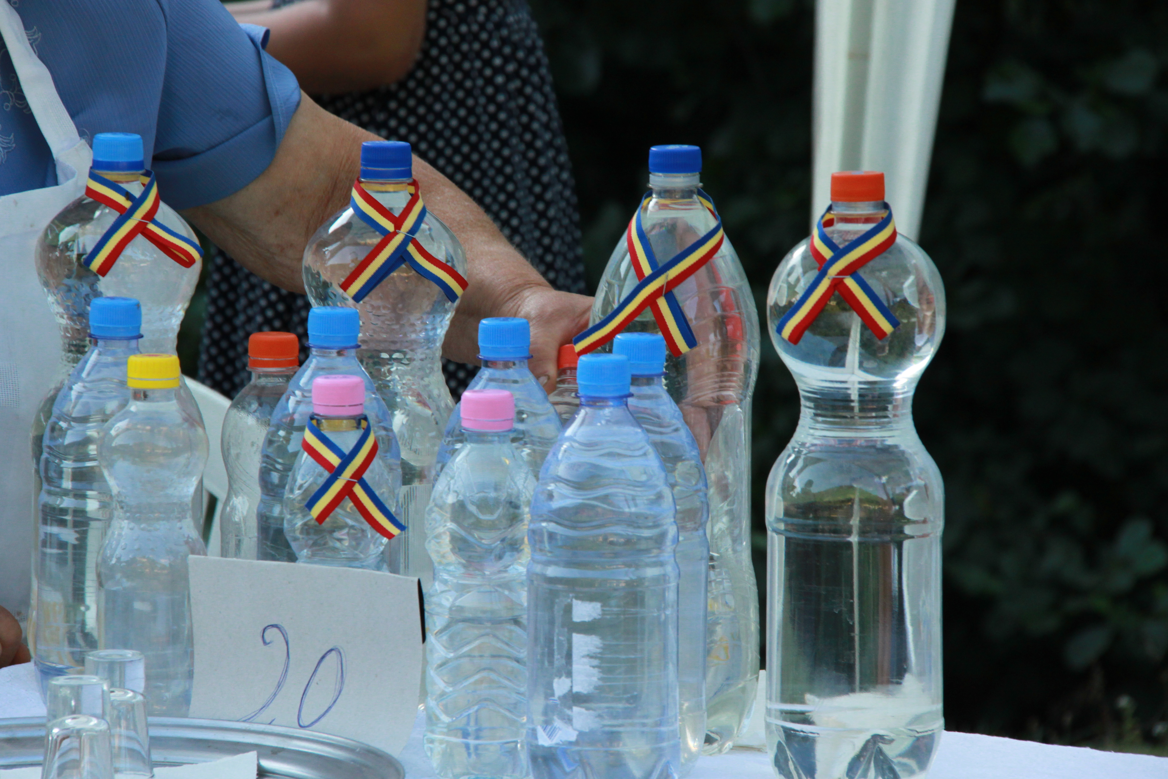 Rășinari, FESTIVALUL BRÂNZEI ȘI ȚUICII